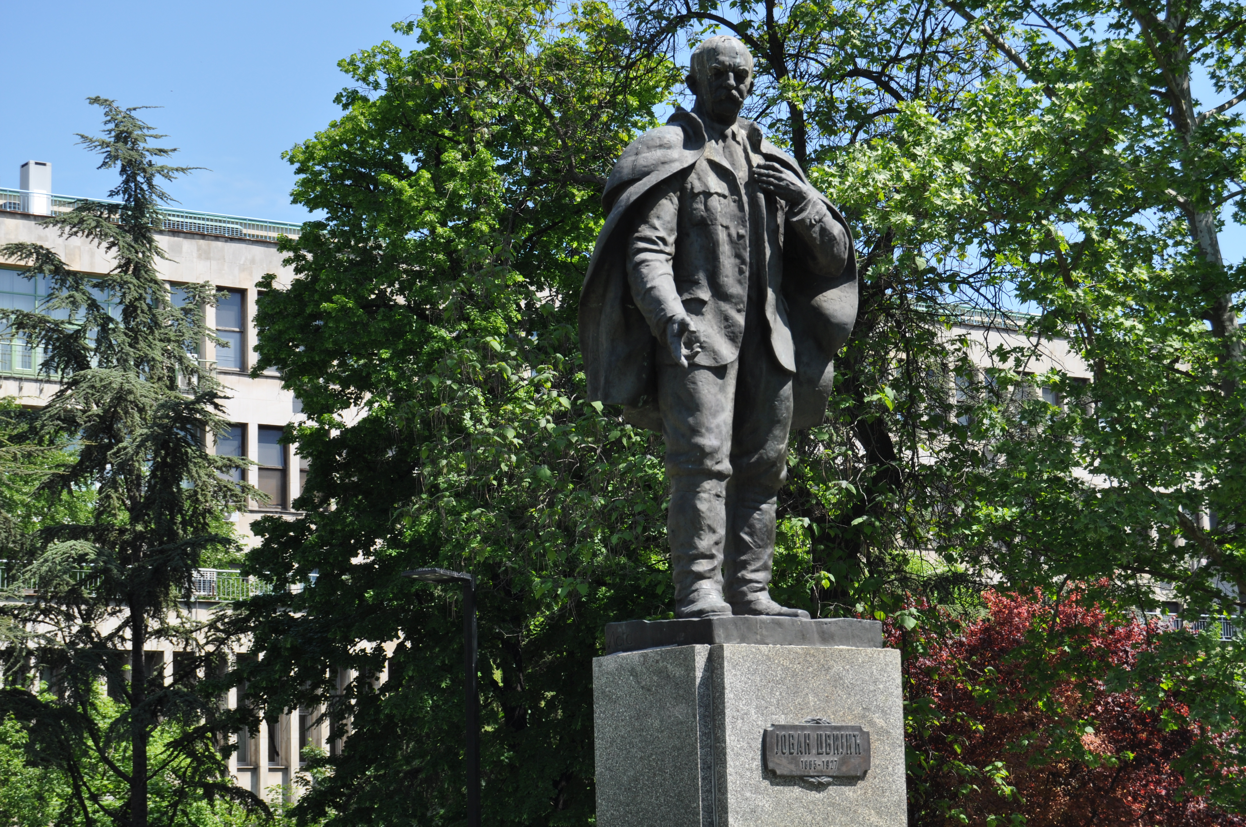 Српски (ћирилица): Ово је фотографија заштићеног природног добра у Србији под шифром: СП001 This is a a photo of a natural area in Serbia with ID: СП001 Споменик Јовану Цвијићу у Академском парку у Београду